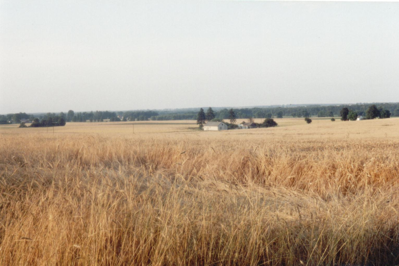 Widok na fragment wsi Nowy Dwór-Parcela